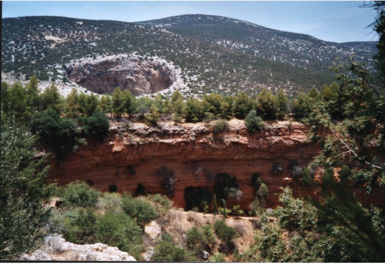 (Einsturz)Dolinen von Didyma (Griechenland)